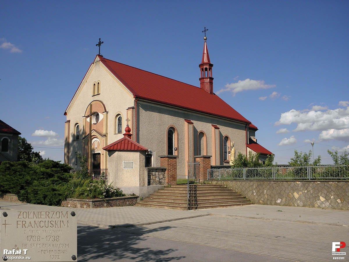 Kościół parafialny w Wysokiej, w rogu kadru tablica umieszczona na kapliczce przy wejściu na teren kościoła.